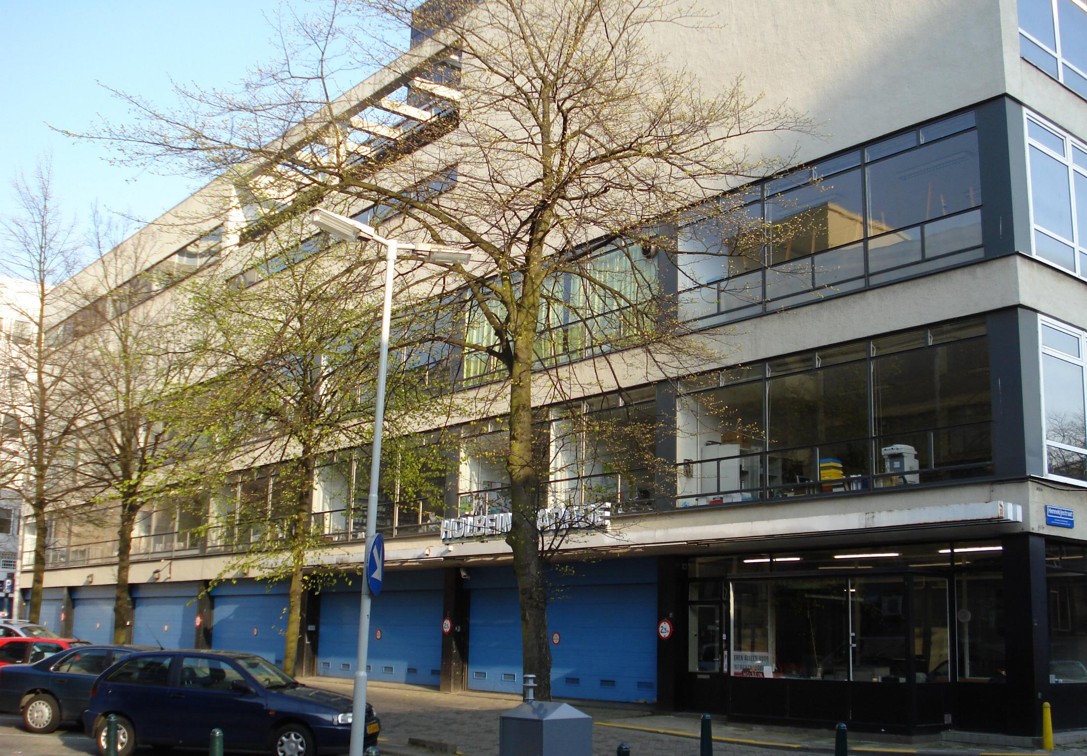 Rotterdam, St Luciastraat. Voorgedragen als rijksmonument, oktober 2007.